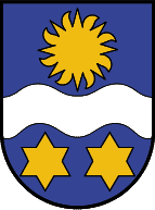 Lorüns, Vorarlberg: In Blau ein silberner Wellenbalken, begleitet oben von einer goldenen Sonne, unten von zwei goldenen sechsstrahligen Sternen. (Verleihung: 29. August 1967)